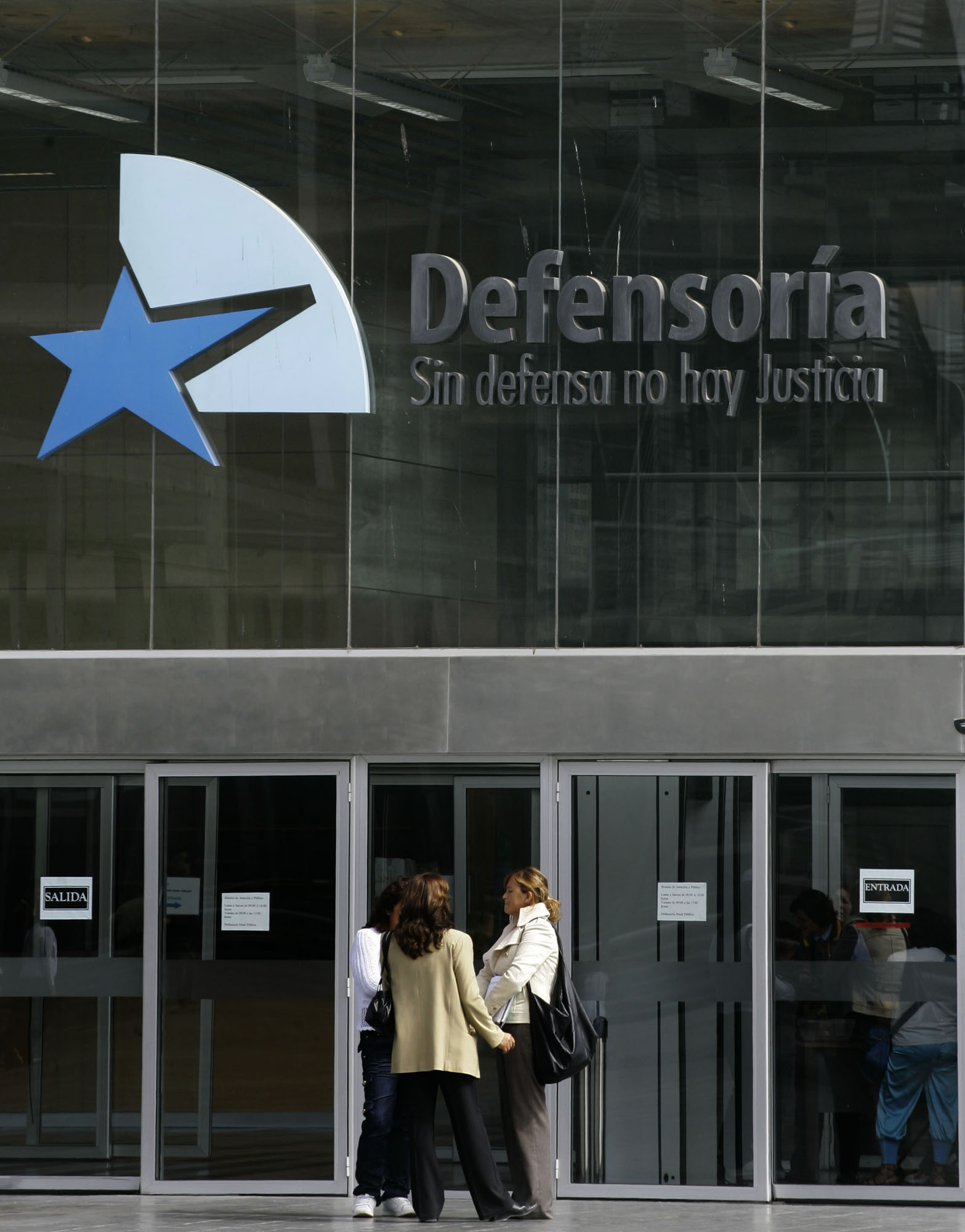 Esta institución fue creada a través de la Ley 19.718, en el año 2001, bajo el marco de la Reforma Procesal Penal para proporcionar defensa penal a los imputados o acusados por un crimen, simple delito o falta que carezcan de abogado